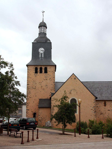 L'Huisserie (Mayenne) - Eglise St Siméon